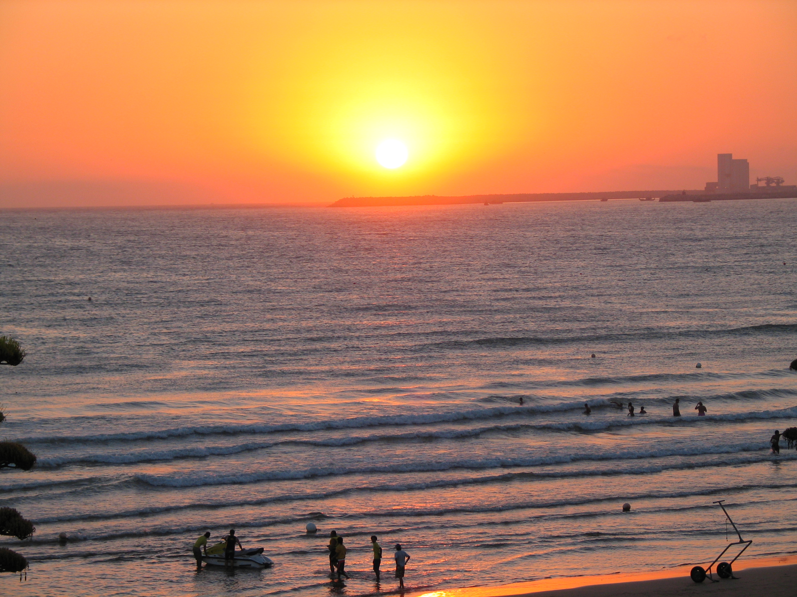 Agadir (Maroc), coucher de soleil sur la baie